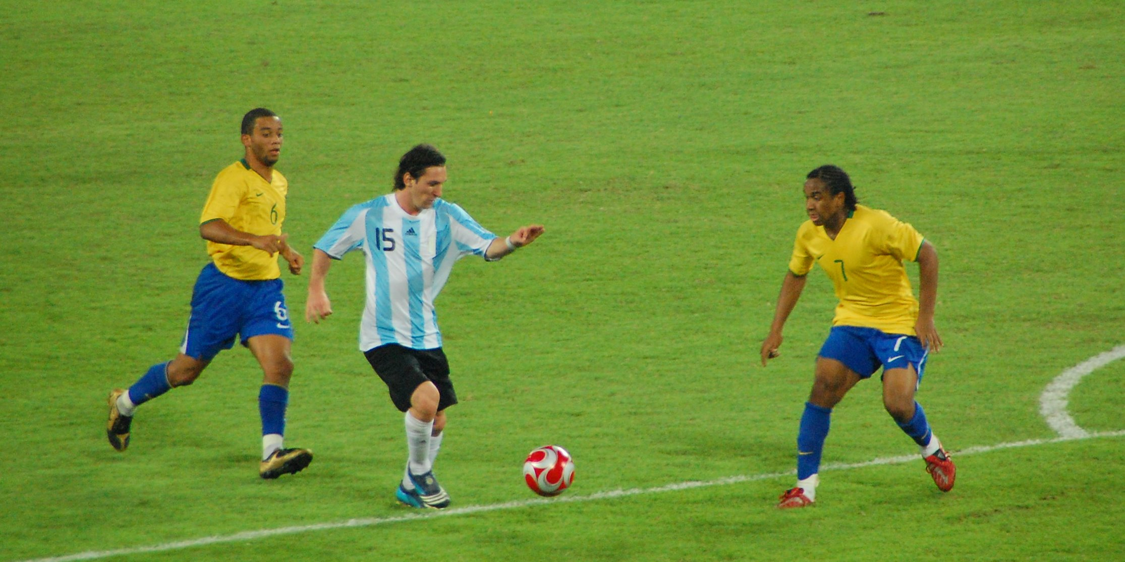 Messi